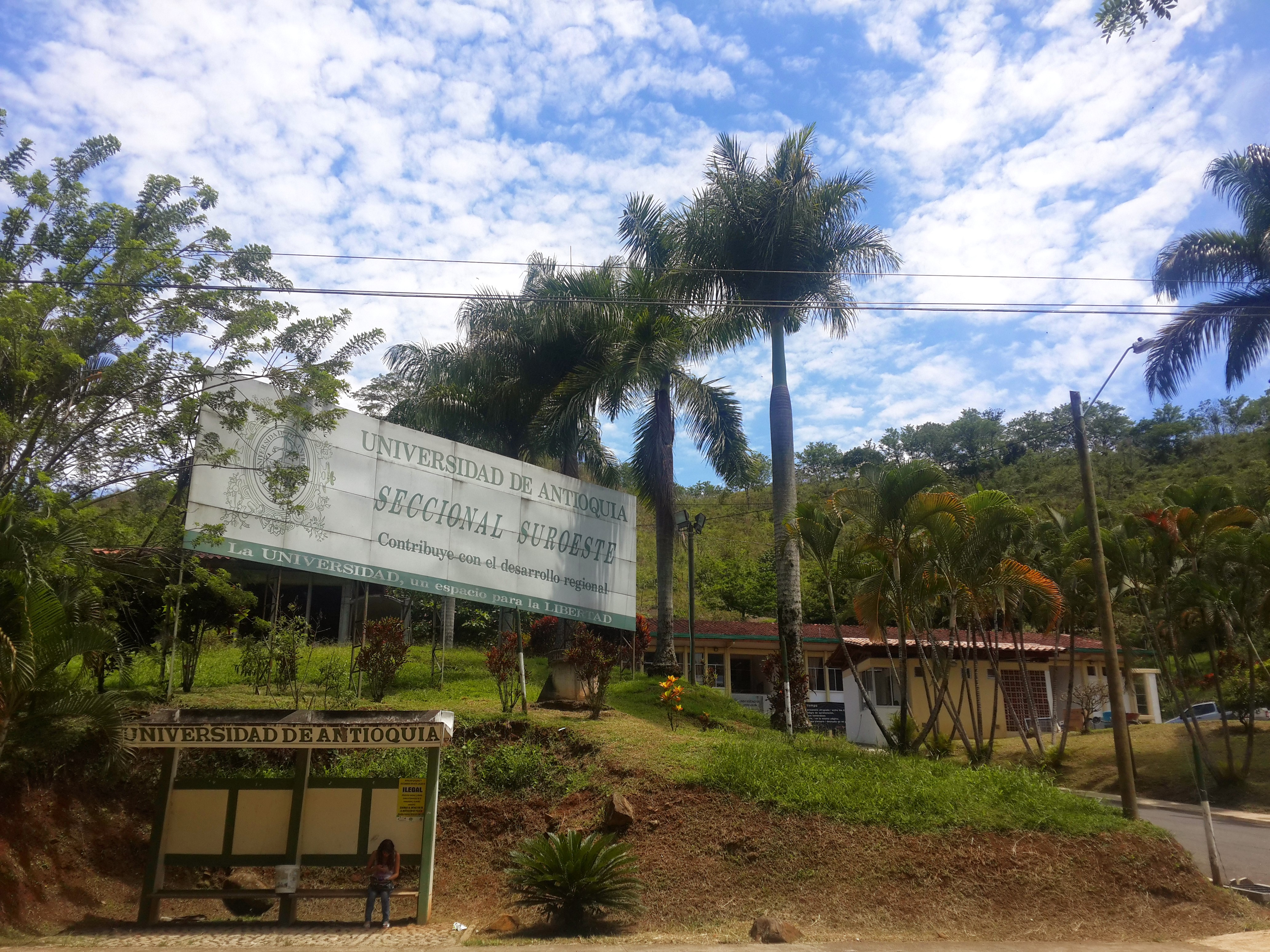 Seccional Suroeste UDEA